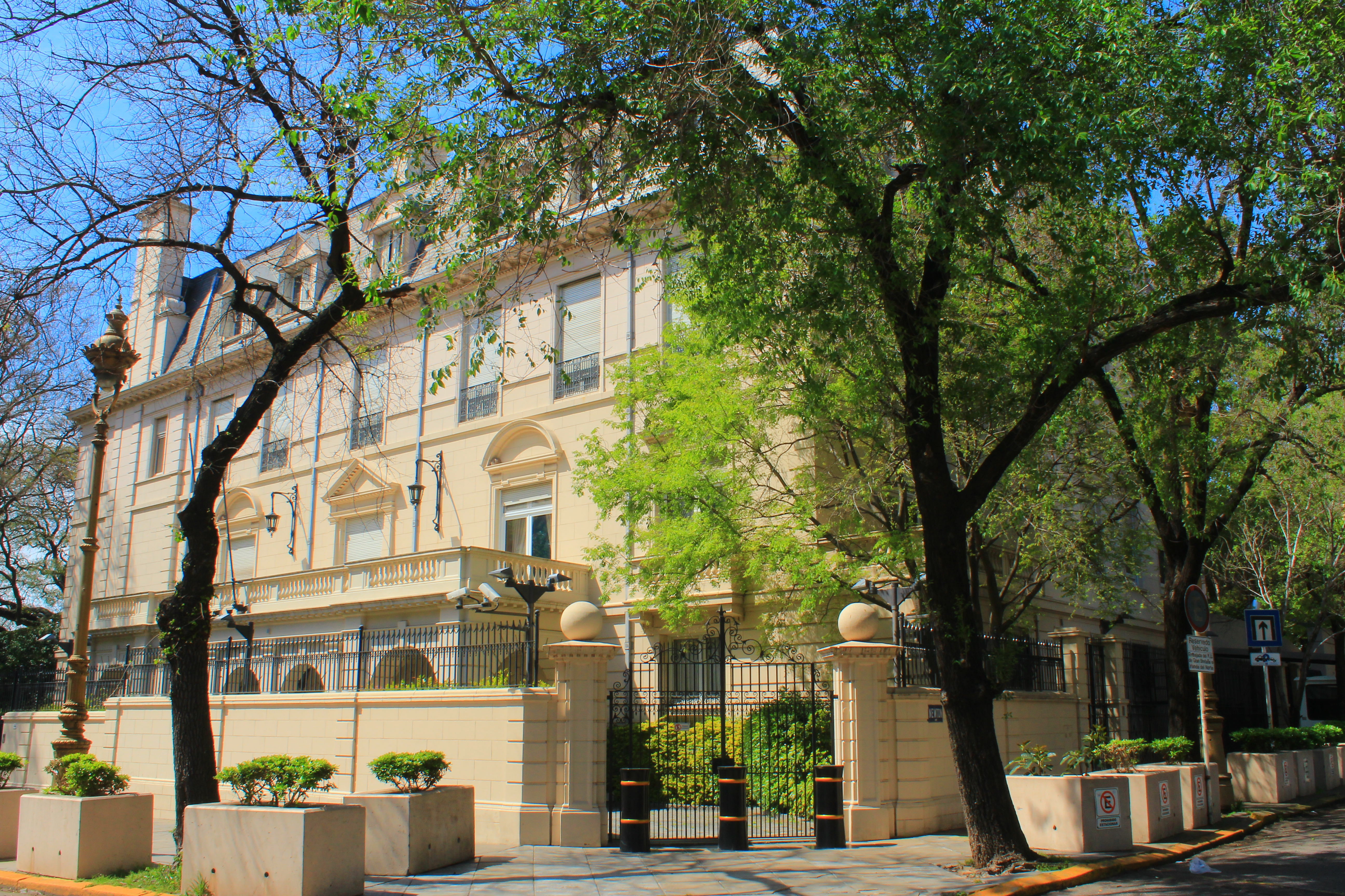 Embajada del Reino Unido de Gran Bretaña e Irlanda del Norte